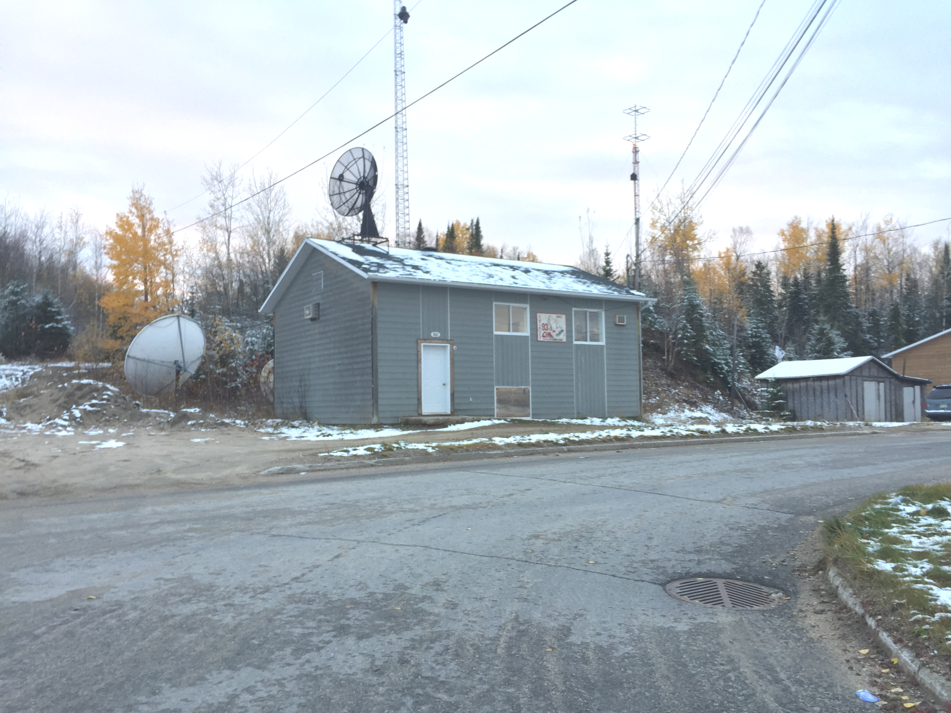 Radio communautaire de Manawan, CHMK 93,1 fm. Atikamekw : Manawan Kitotakan, CHMK 93,1 fm.